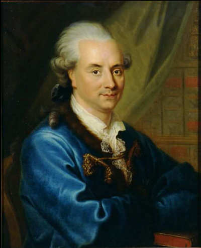 Stephan von Stengel Bayerisch-Pfälzischer Beamter, Vertrauter von Kurfürst Karl-Theodor, Finanz- und Wirtschaftsreformer, Maler